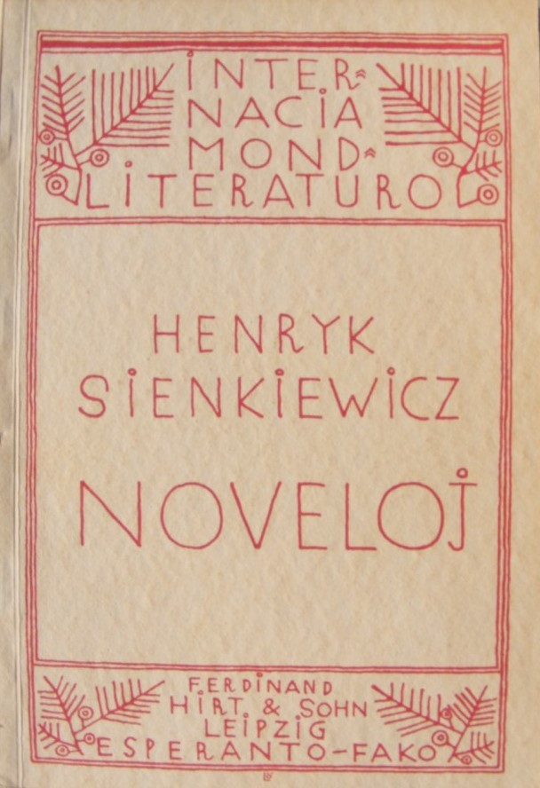 Noveloj